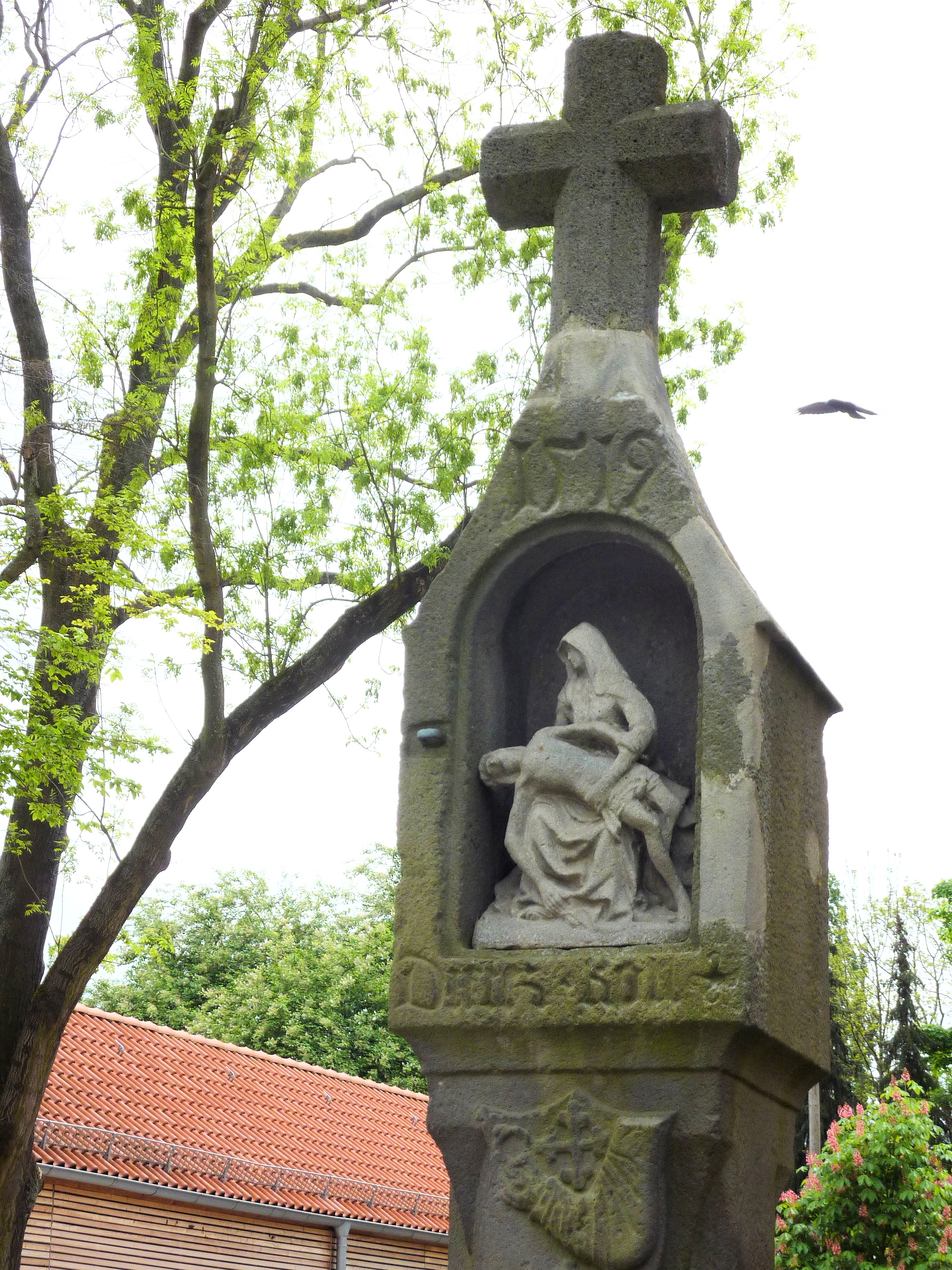 Steinerner Bildstock mit Pietà aus dem Jahr 1519 an der Gerbermühle im Stadtteil Oberrad in Frankfurt am Main